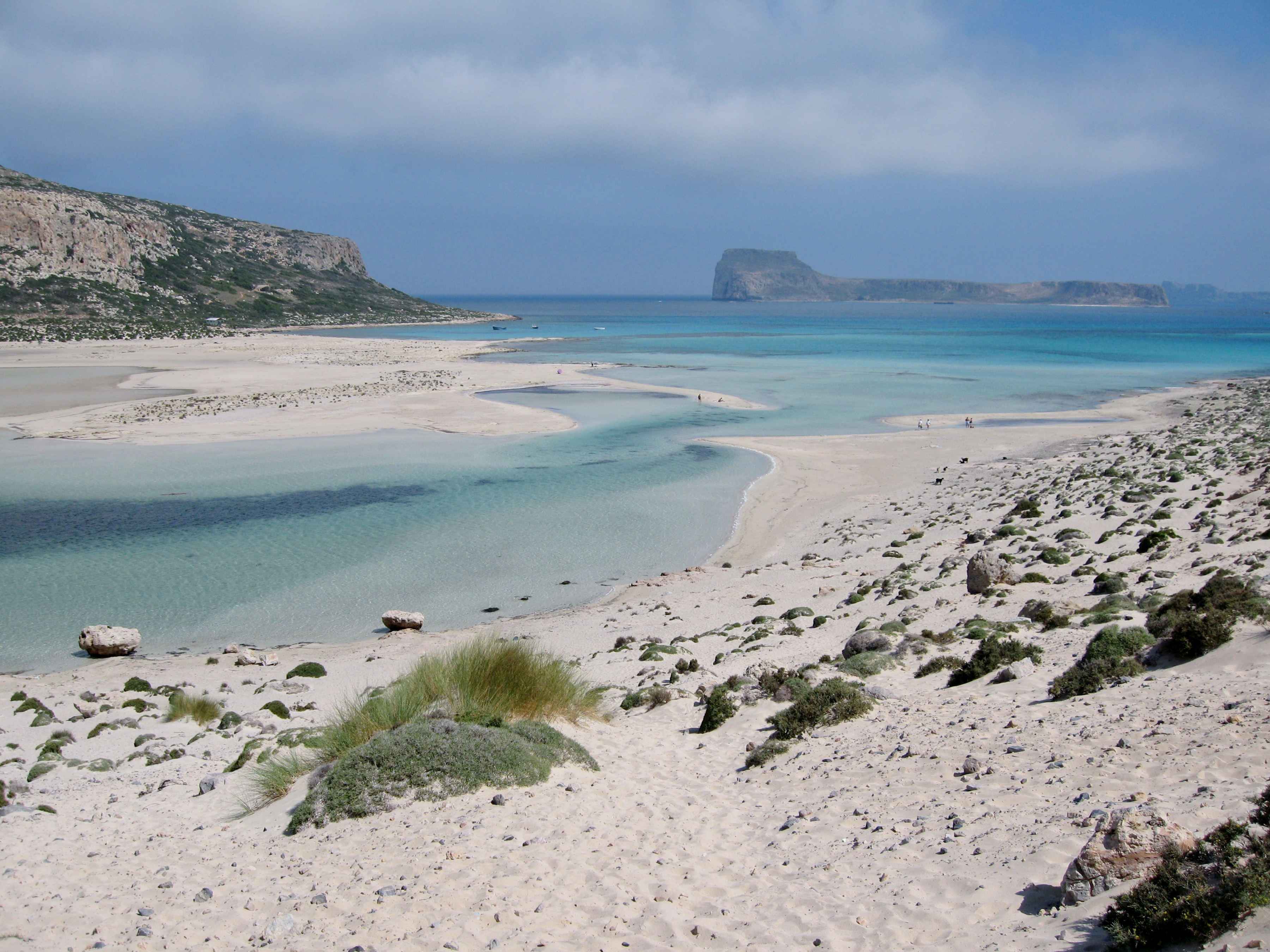 Bucht von Balos (Μπάλος) mit Blick auf Imeri Gramvousa ('Ημερη Γραμβούσα), Gemeinde Kissamos, Regionalbezirk Chania, Kreta, Griechenland